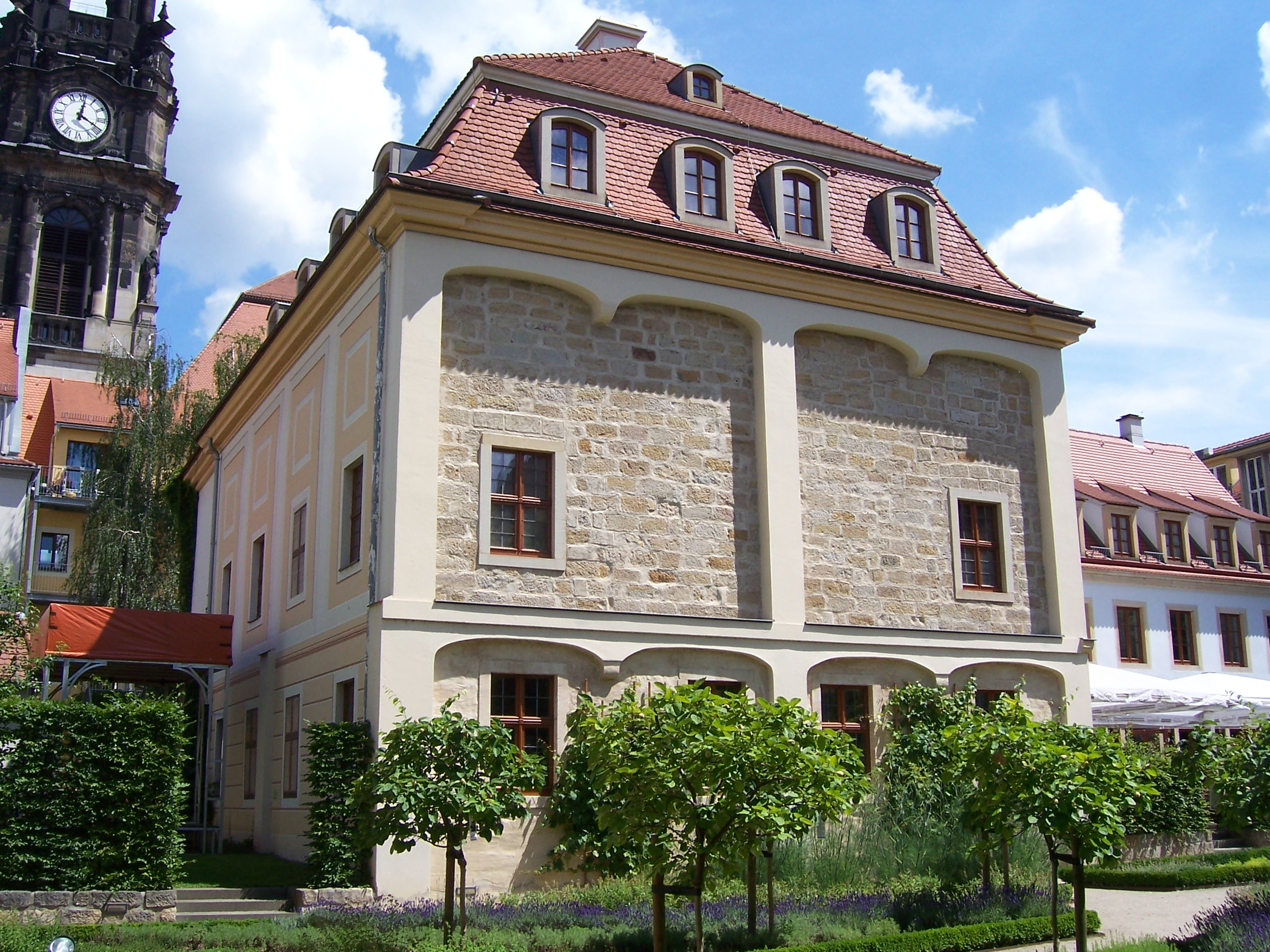 Früher ein barockes Gartenhaus, heute Sitz des Societaetstheaters Dresden.